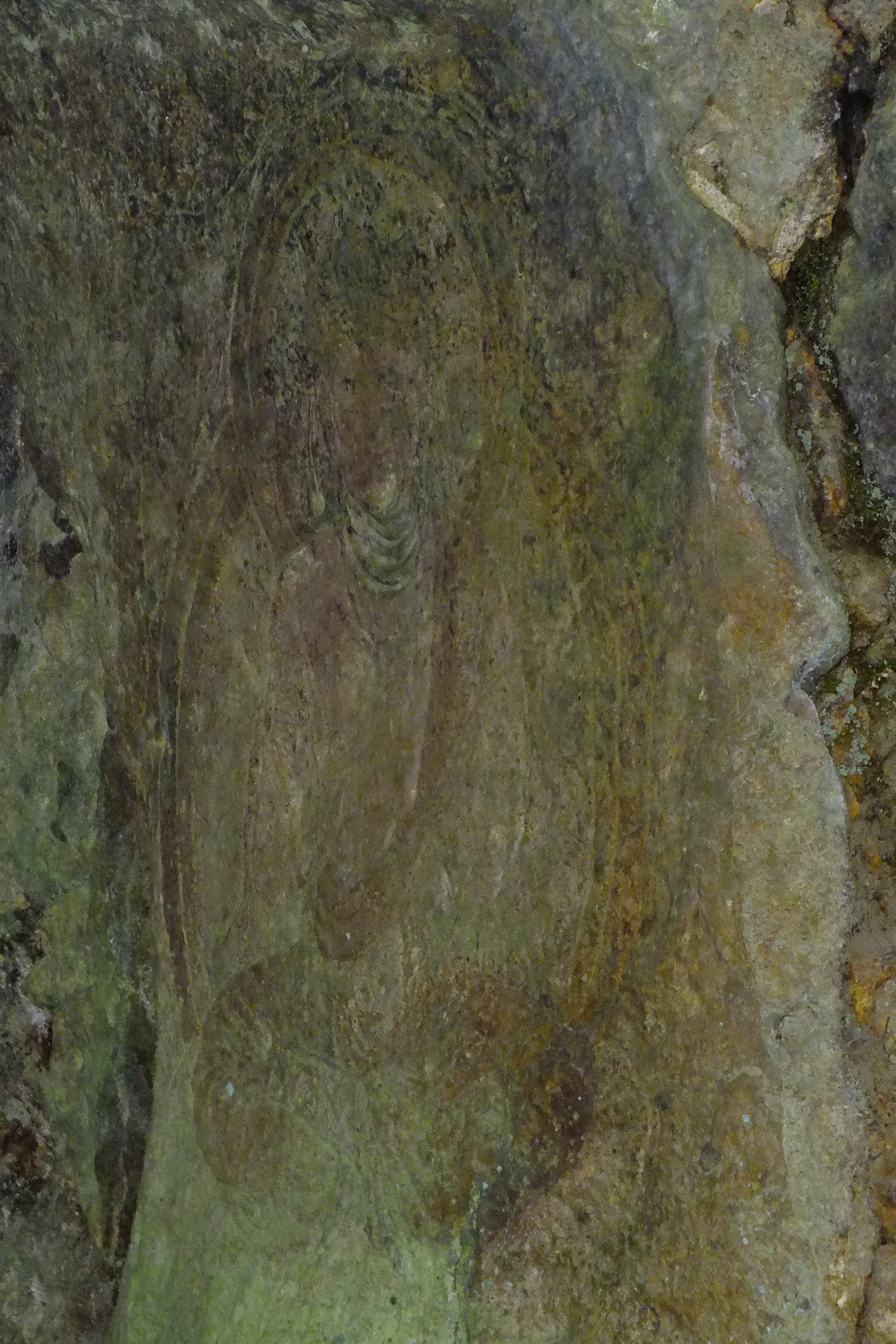 2017-04-22 Jigokudani Sekkutsubutu 地獄谷石窟仏 柳生街道